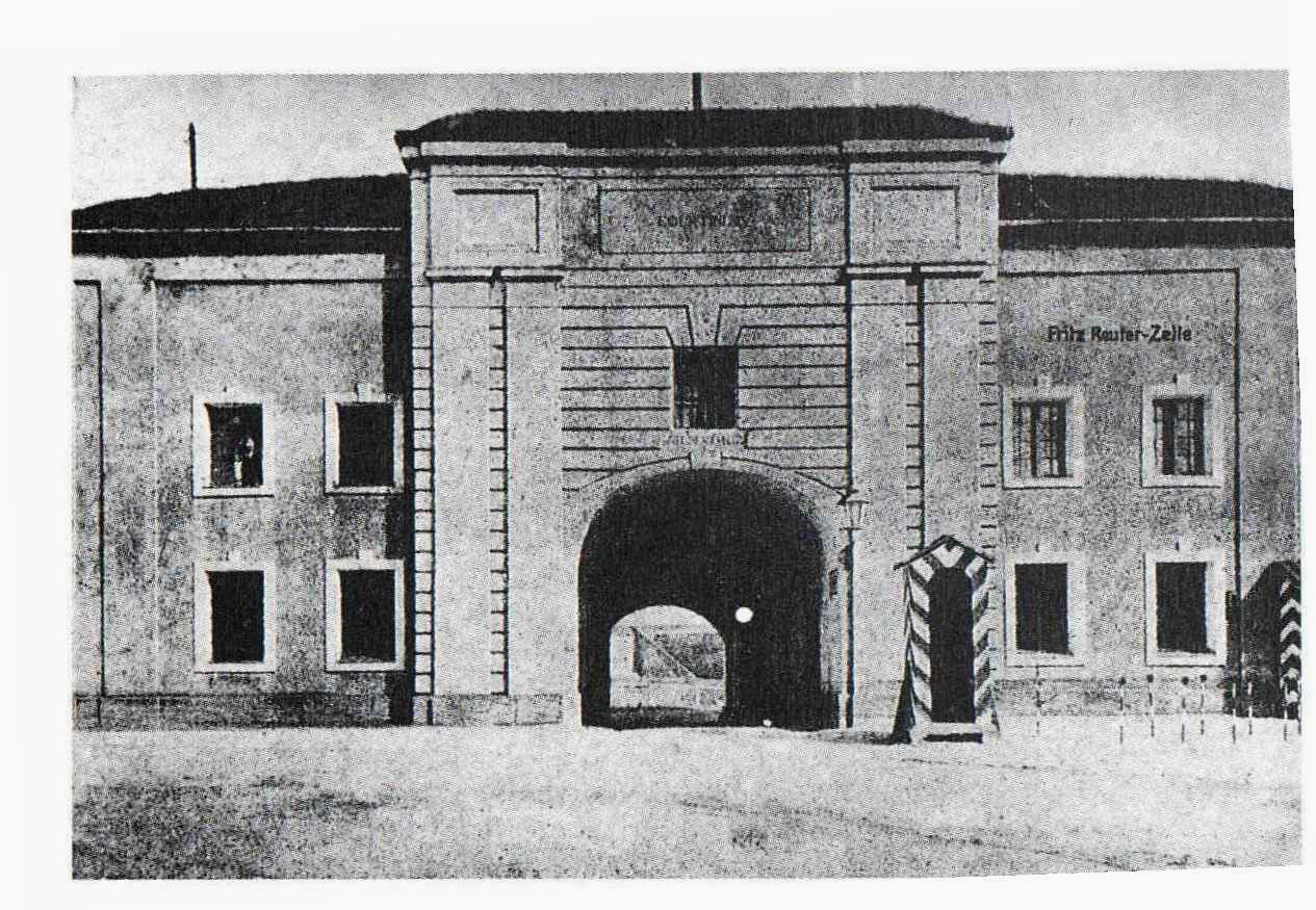 Grudziądz - Twierdza Grudziądz, cytadela (zabytek nr 597)